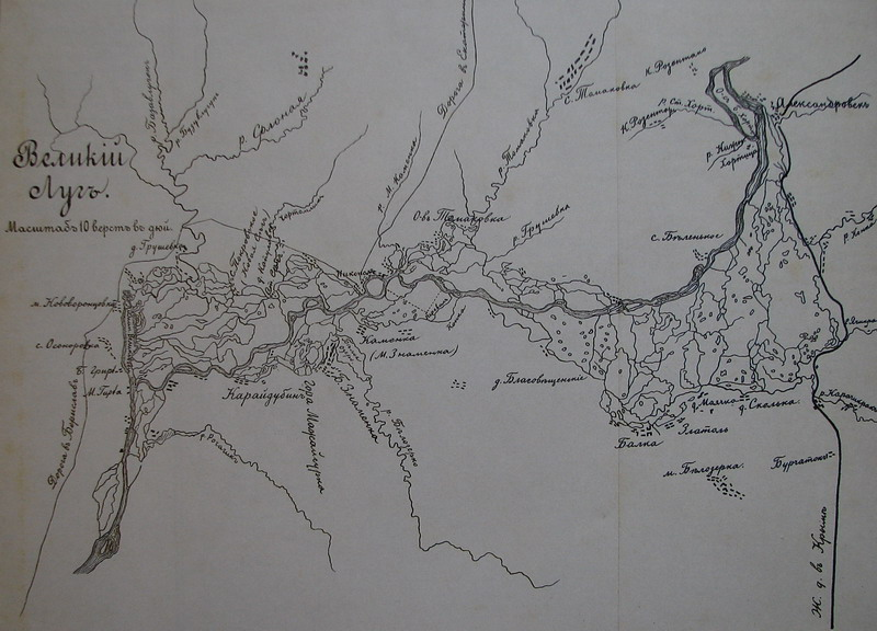 Карта исторической области Великого Луга. 1894 г.